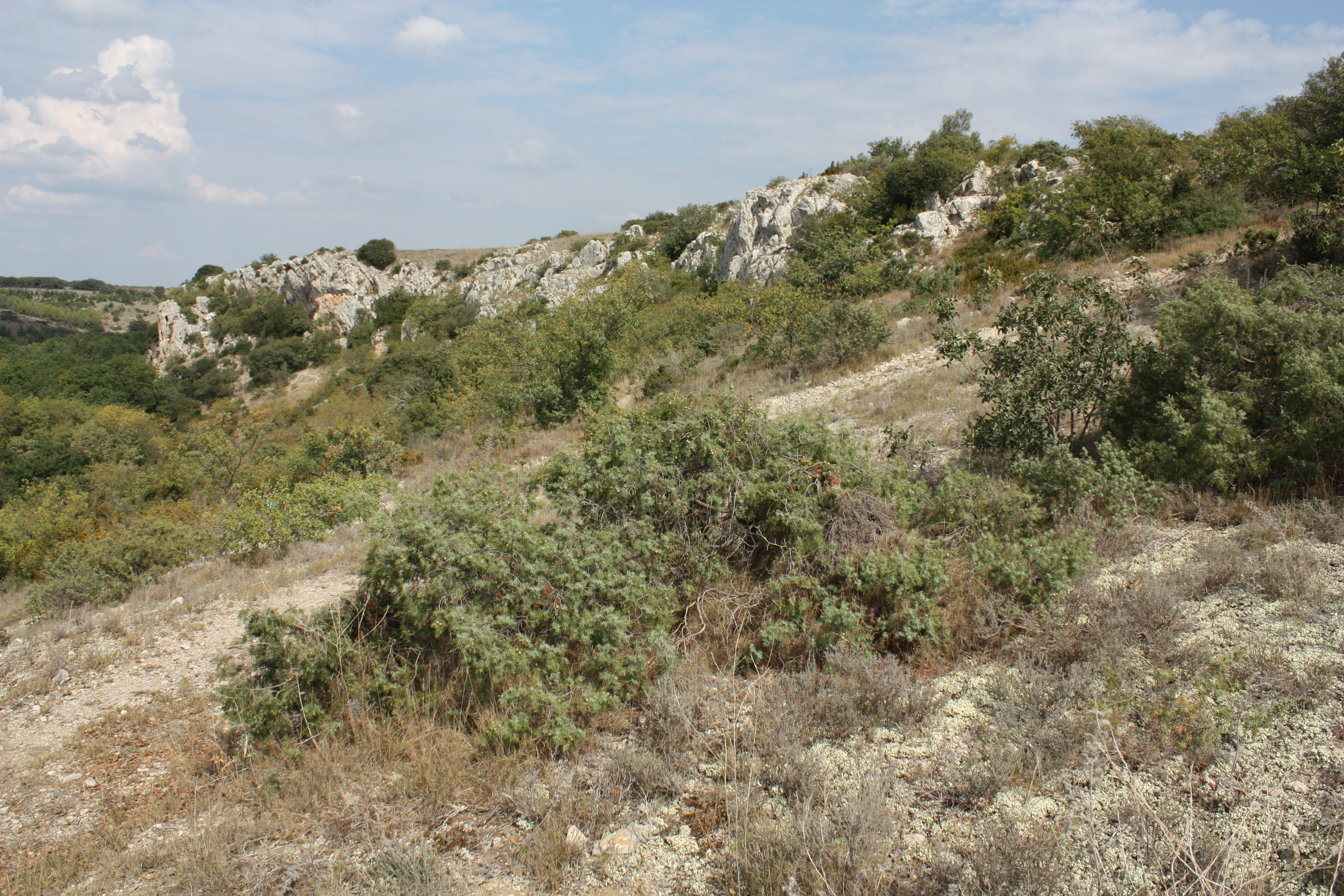 Oppidum de la Roque - Falaise sur le Coulazou Cet oppidum s'élève sur un éperon rocheux d'une cinquantaine de mètres au confluent de la Mosson, du Lez et du Coulazou. Parfaitement fortifié, l'éperon était déjà défendu naturellement par deux à-pics. Les objets découverts au 18ème siècle et après ont permis d'attribuer sa construction aux Volques Arécomiques. Source : Persée / Audibert Jacques. L'Oppidum de La Roque, commune de Fabrègues (Hérault). In: Bulletin de la Société préhistorique française. 1956, tome 53, N. 10. pp. 599-608. .